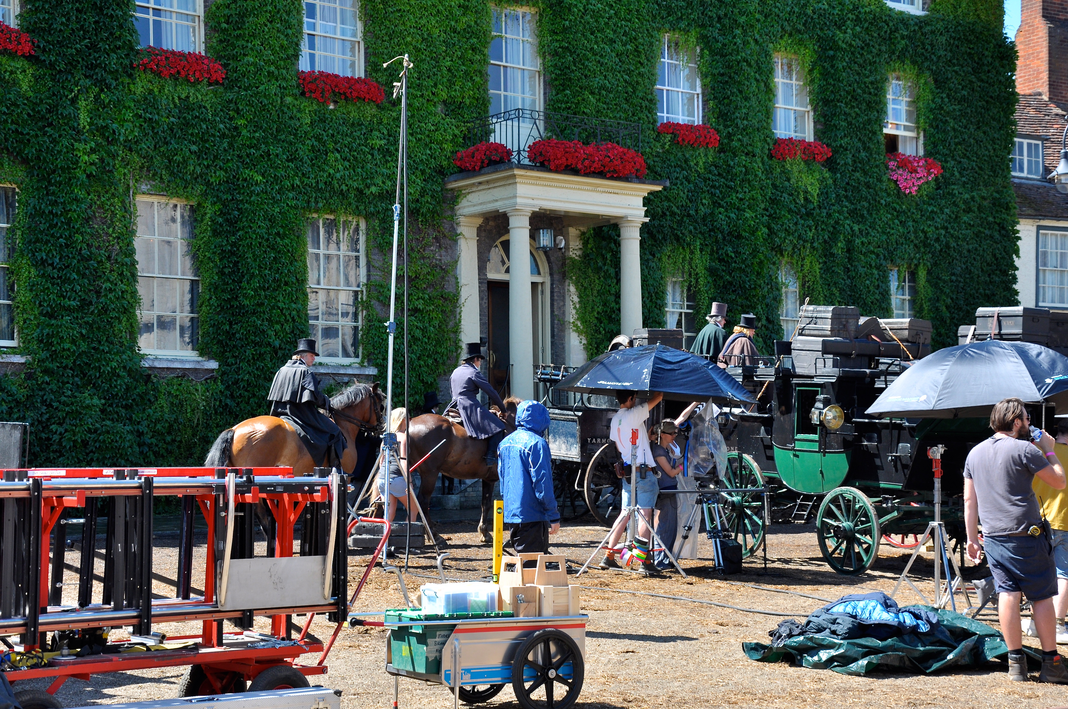 David Copperfield Filming On Angel Hill, Bury St Edmunds Suffolk, 3-7-2018